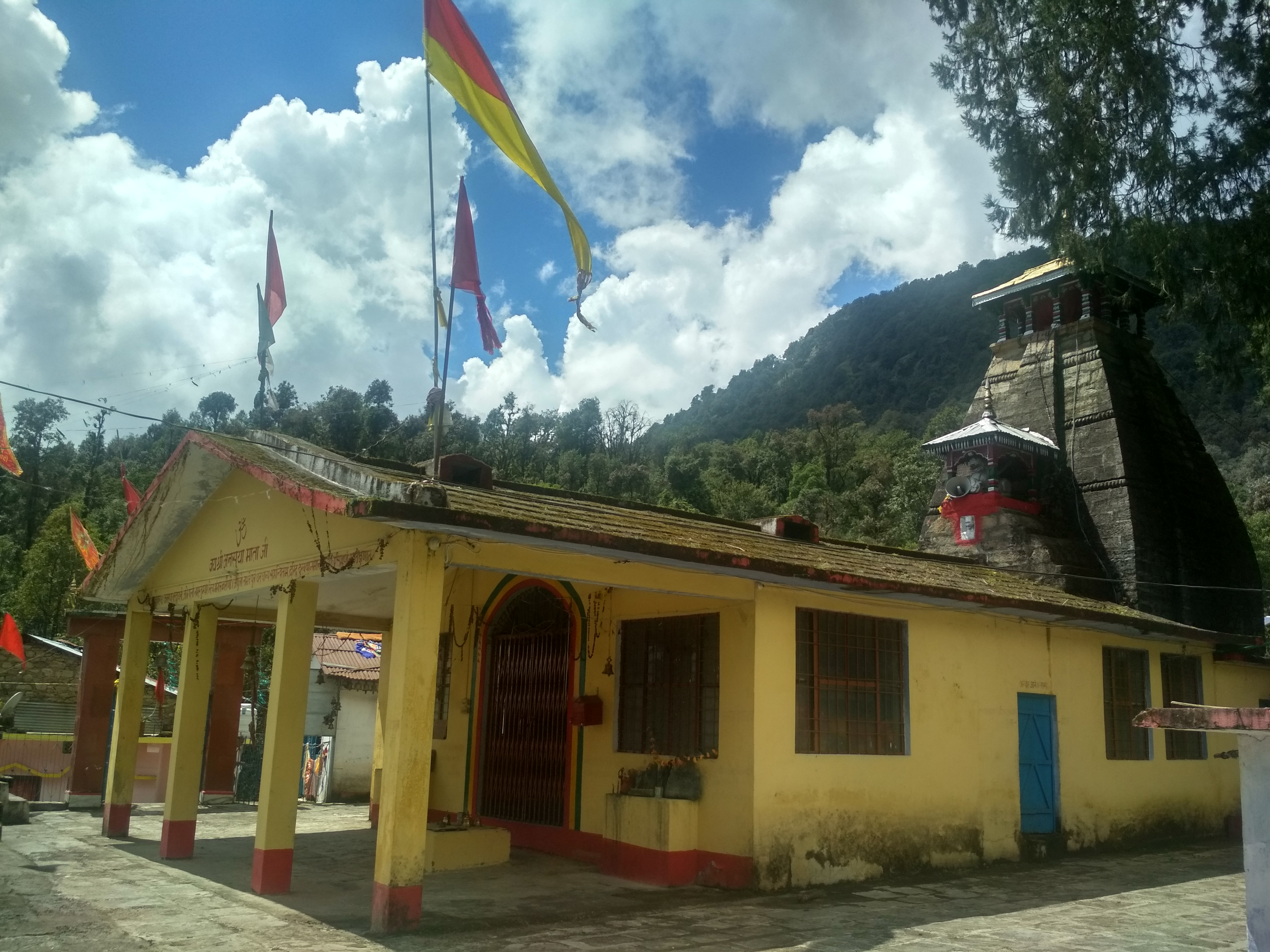 अनसूया मंदिर का प्रांगण